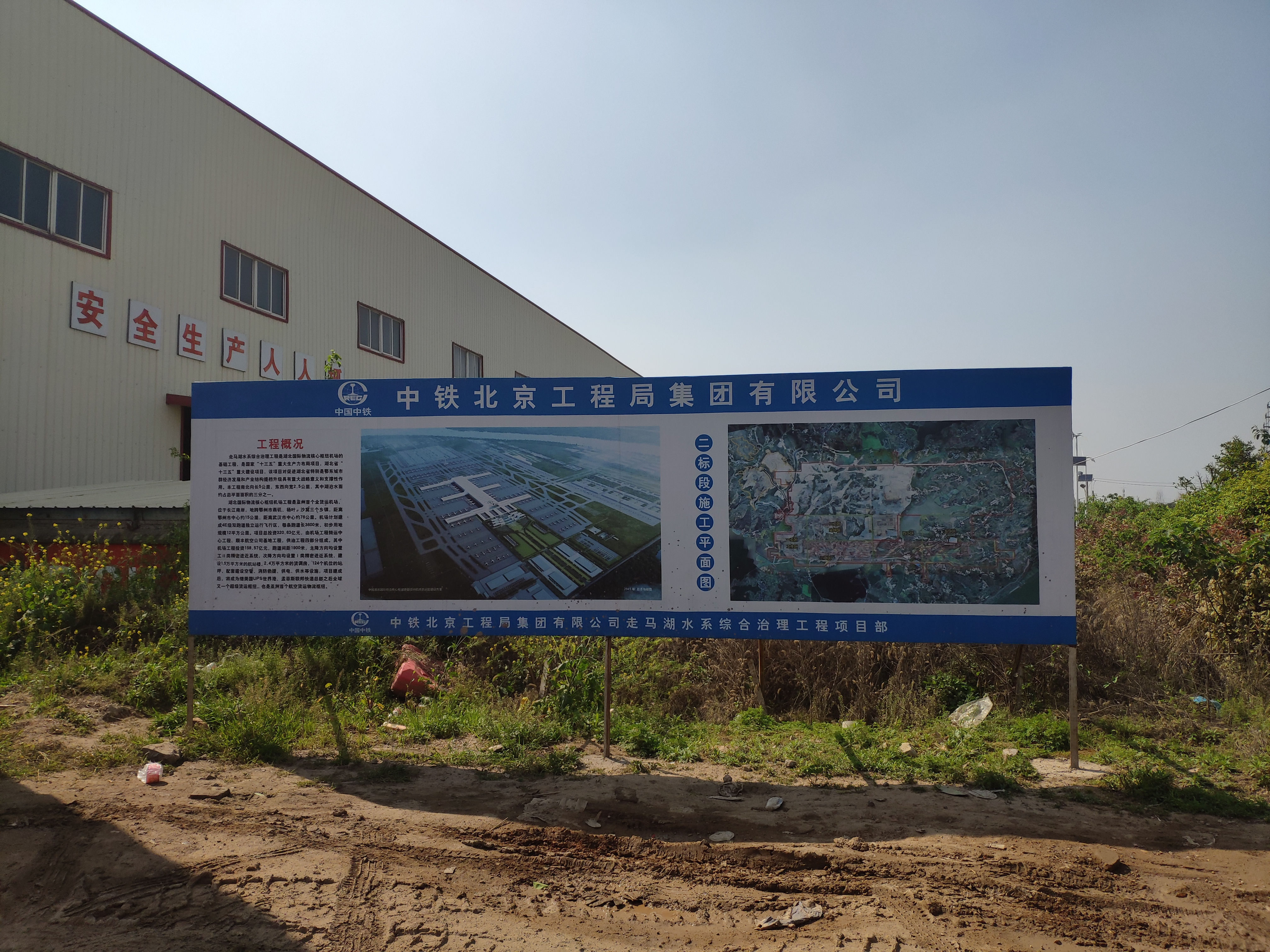 中文（中国大陆）: 鄂州机场效果图